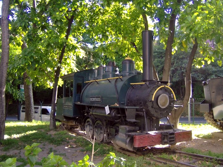 Museo del Transporte de Caracas 1987